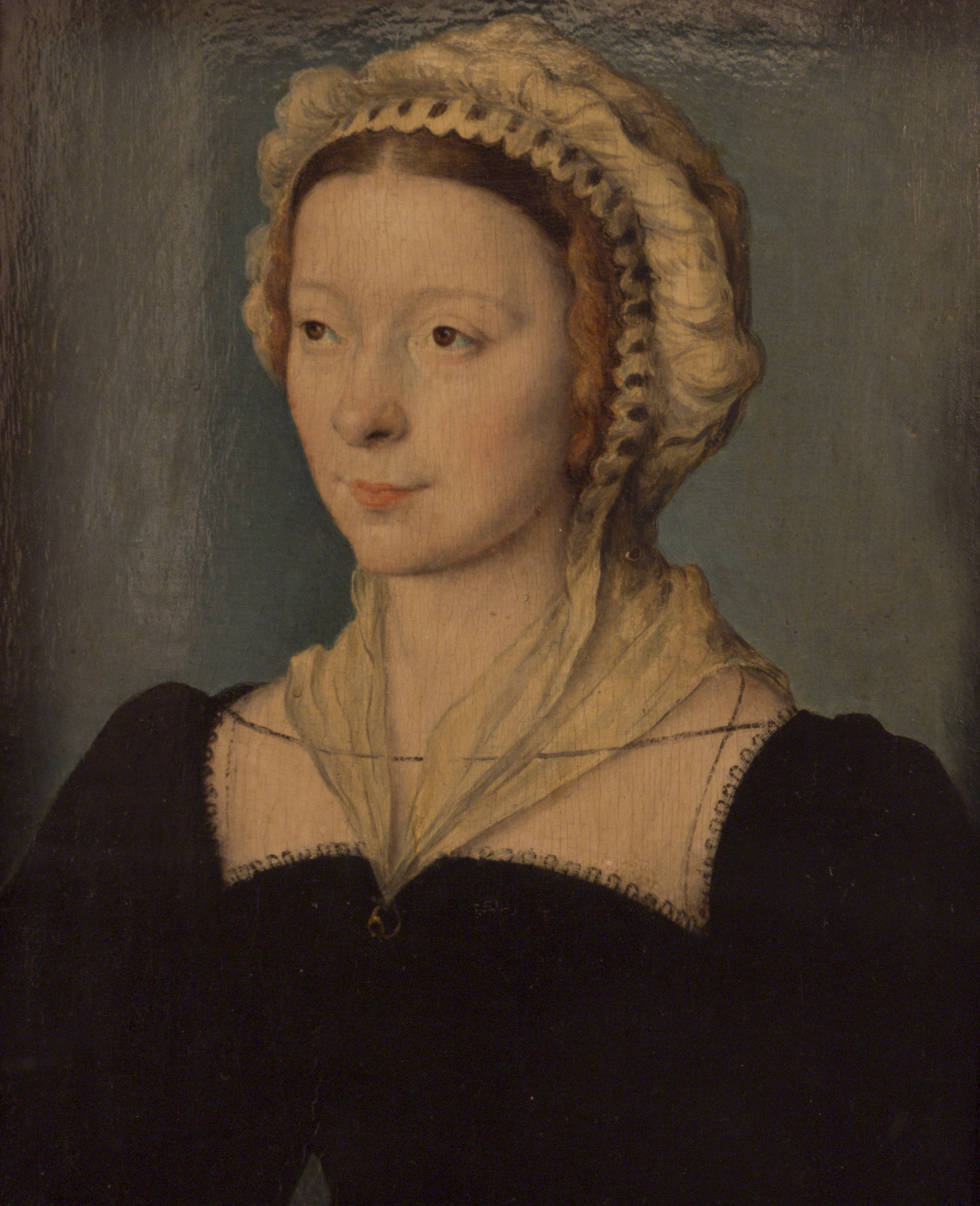 Béatrix Pacheco, comtesse d’Entremont. Huile sur bois.